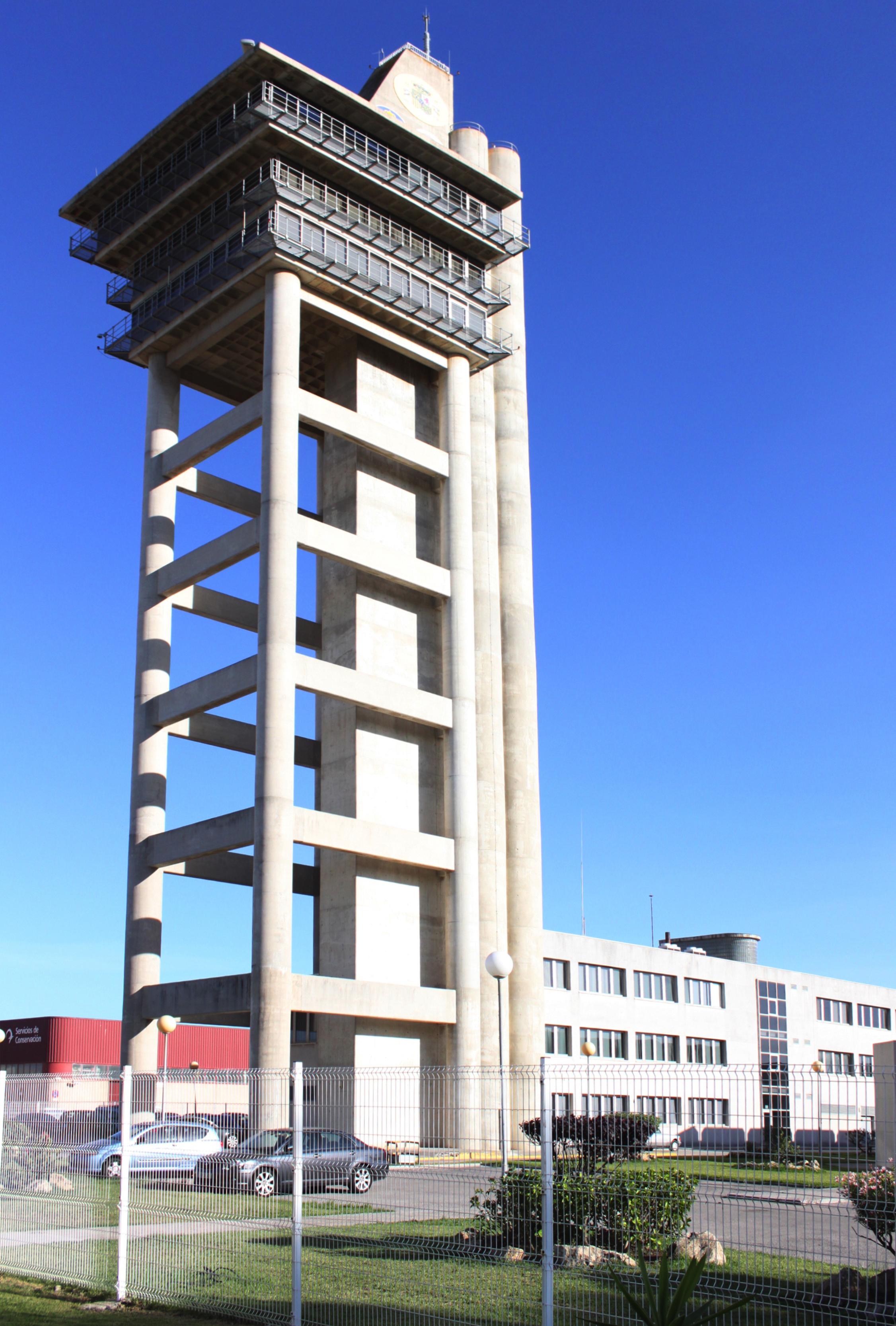 Torre de control del Puerto de Algeciras (Andalucía, España) situada en la playa de El Chorruelo de esta localidad.